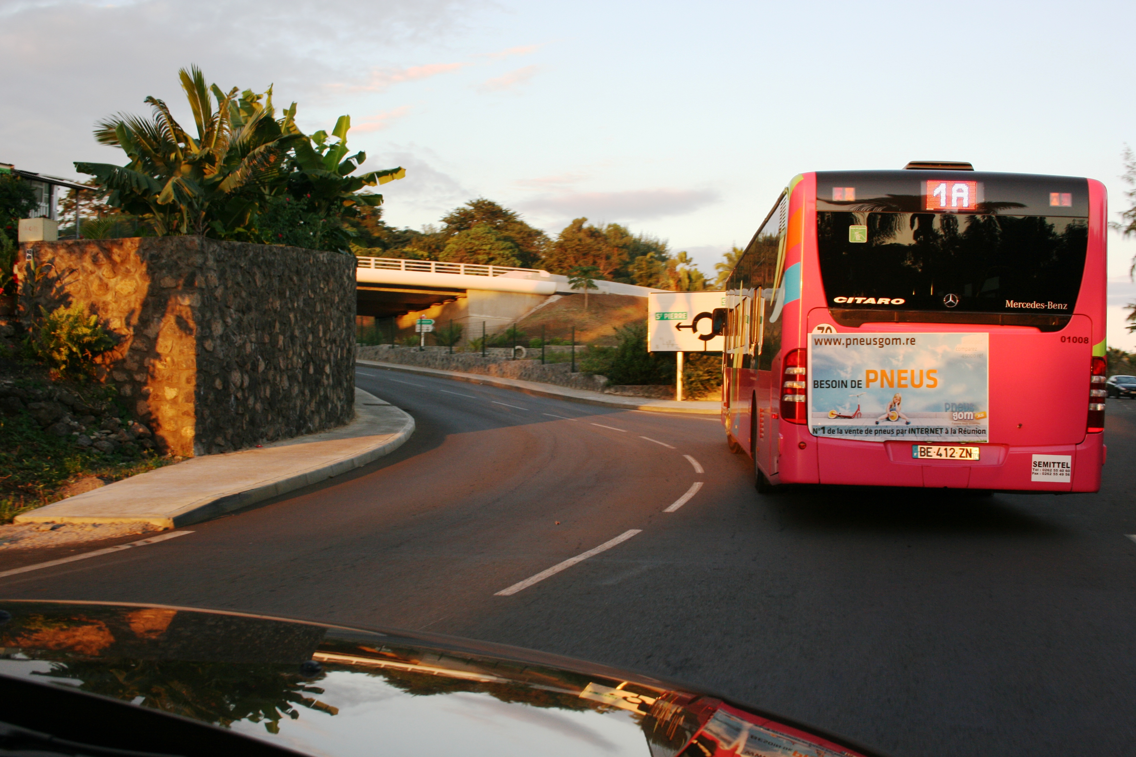 Vue d'un autobus Alternéo près de Grands Bois, à Saint-Pierre de La Réunion.